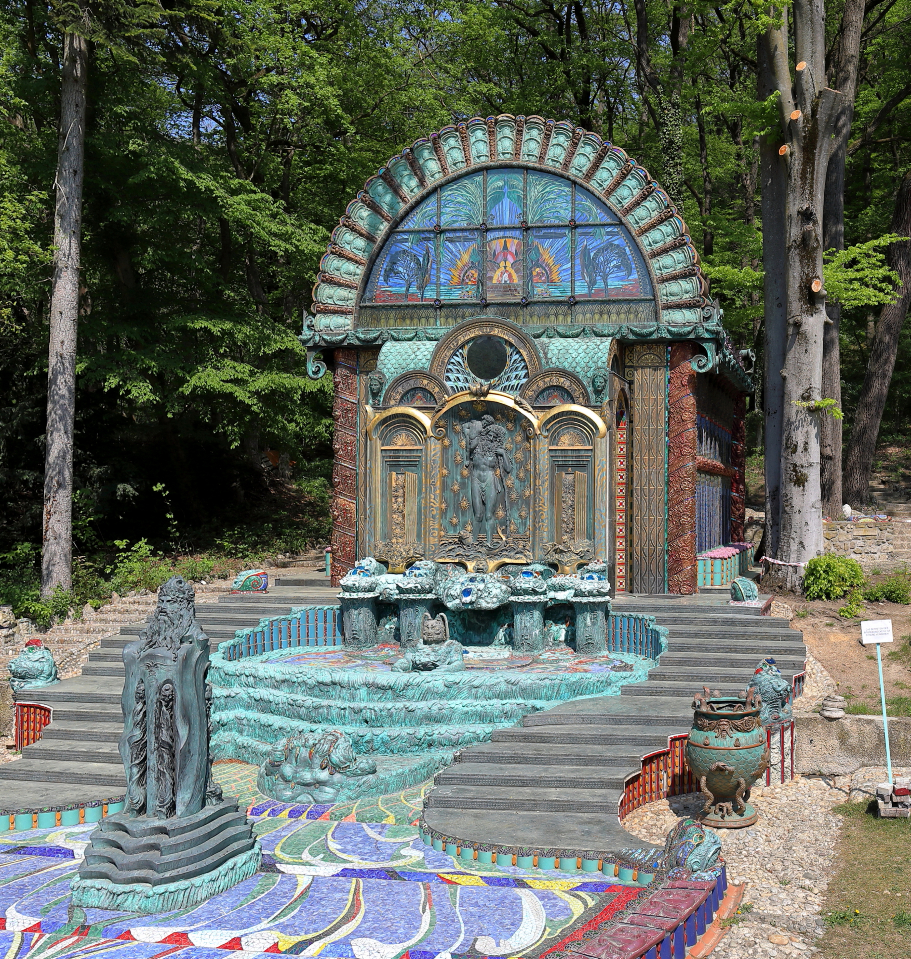 Das Brunnenhaus „Nymphäum Omega“ und davor der „Moses-Brunnen“ nächst der Otto-Wagner-Villa an der Adresse Hüttelbergstraße 26 im 14. Wiener Gemeindebezirk Penzing Der Künstler Ernst Fuchs schuf von 1992 bis 1996 das Brunnenhaus am Fuße der Parkanlage zwischen der ersten und zweiten Otto-Wagner–Villa im byzantinischen Stil. Vorgelagert ist der Moses-Brunnen, der farbenprächtig glänzend mit Tiffany-Glasmosaik belegt ist.